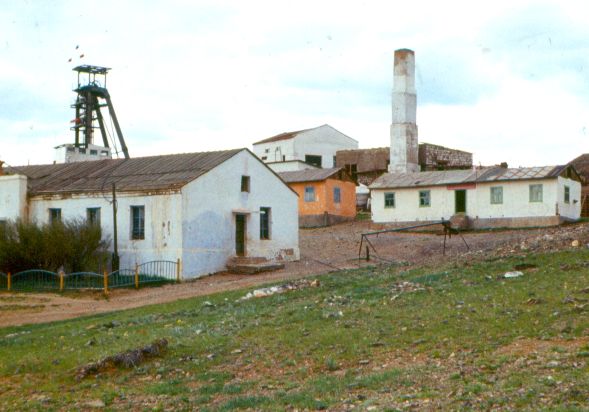 Tagesanlagen und Förderturm Burenzogt, 1977